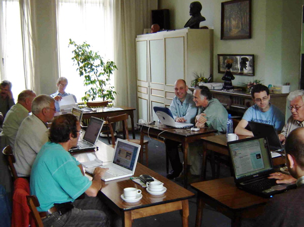 Wikipedia training session during Esperanto meeting in Antwerp. Vikipedio-kurso en Antverpeno, antverpena Esperanto-klubo Verda Stelo, en 2007.